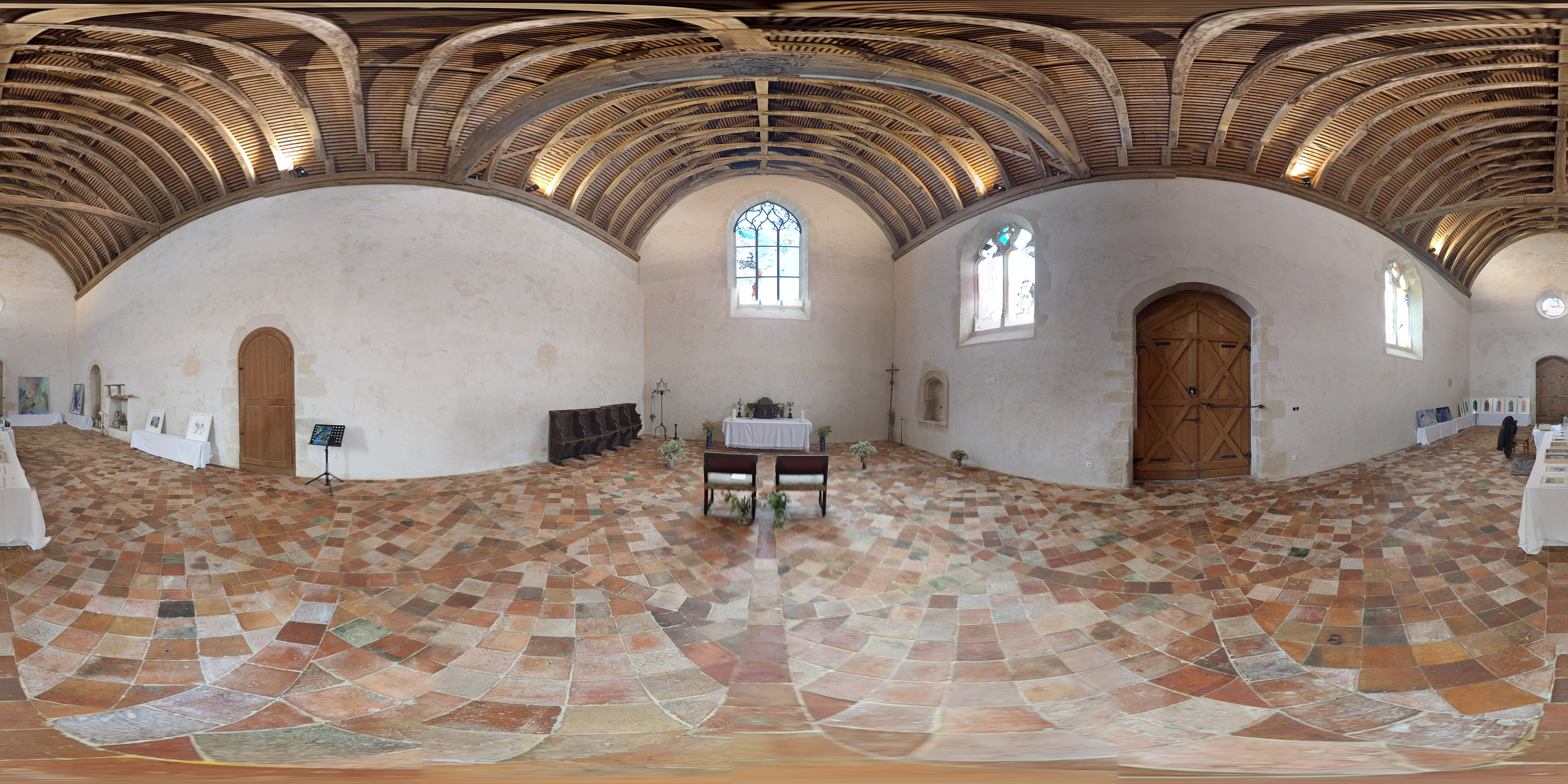 Photo 360 ° de l'intérieur prise lors des journées du patrimoine 2017